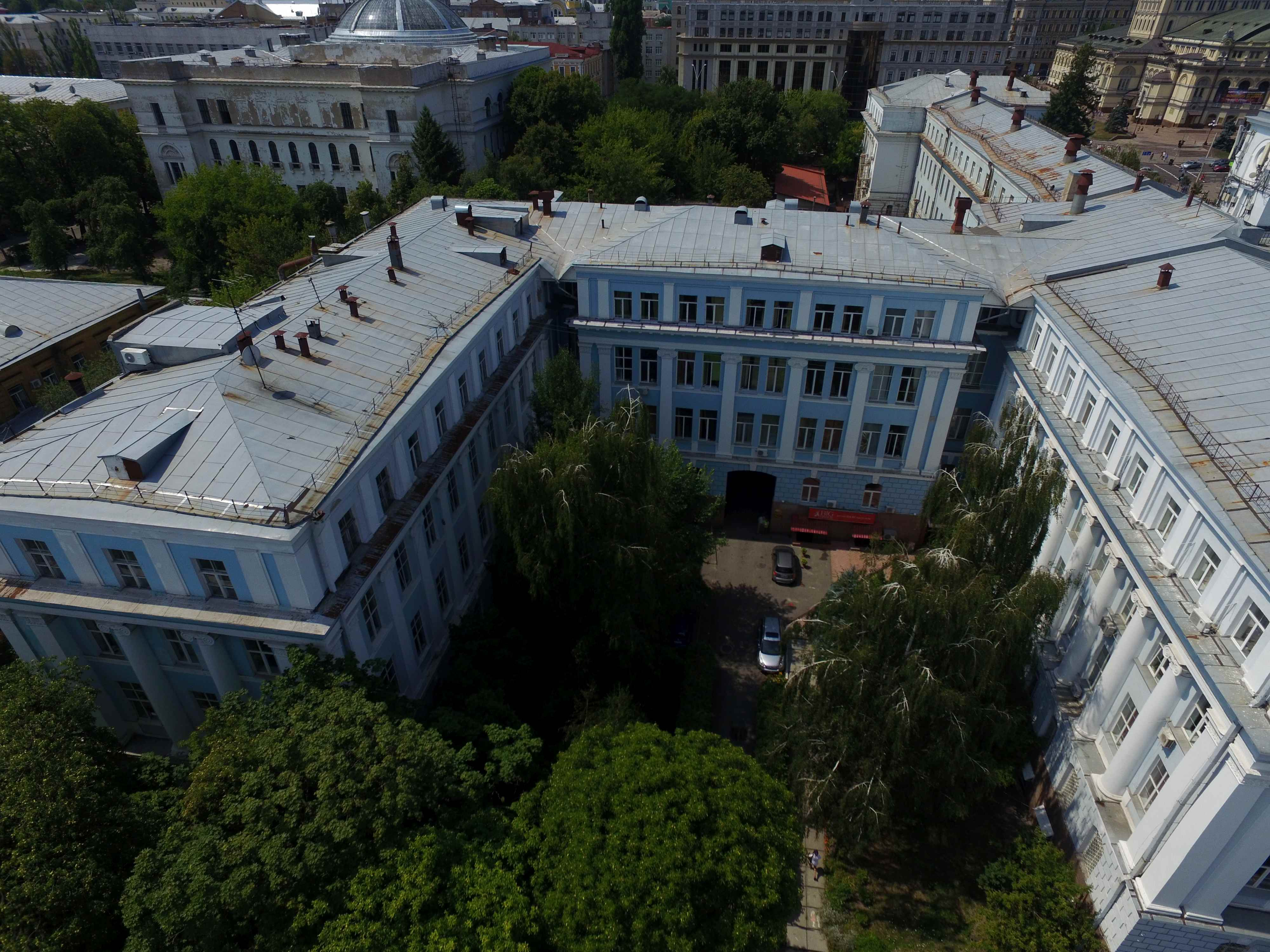 Інститут зоології НАНУ